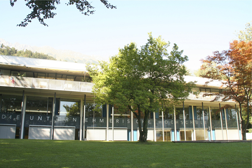 MCI Tourismus-Standort in der Weiherburggasse in Innsbruck.